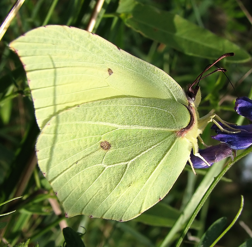 Beschreibung: Zitronenfalter / Brimstone (Gonepteryx rhamni) Fotograf: Darkone, 14. August 2005